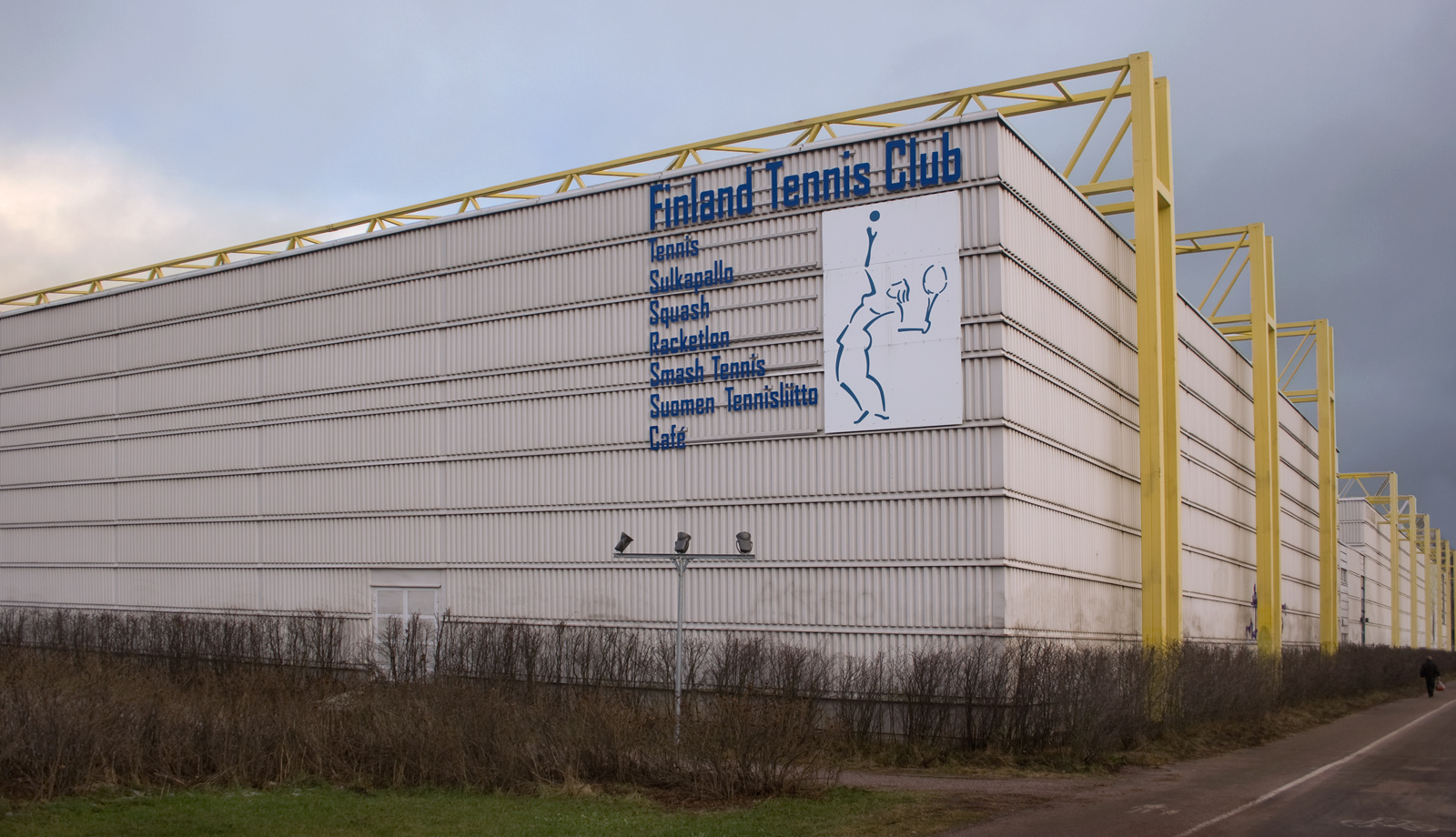 Finland Tennis Club Helsingin Myllypurossa.